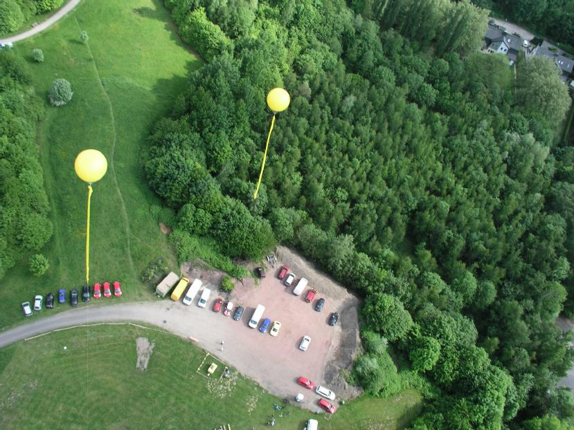 Die zwei SchachtZeichen-Ballone von Constantin 6/7 in Bochum Grumme